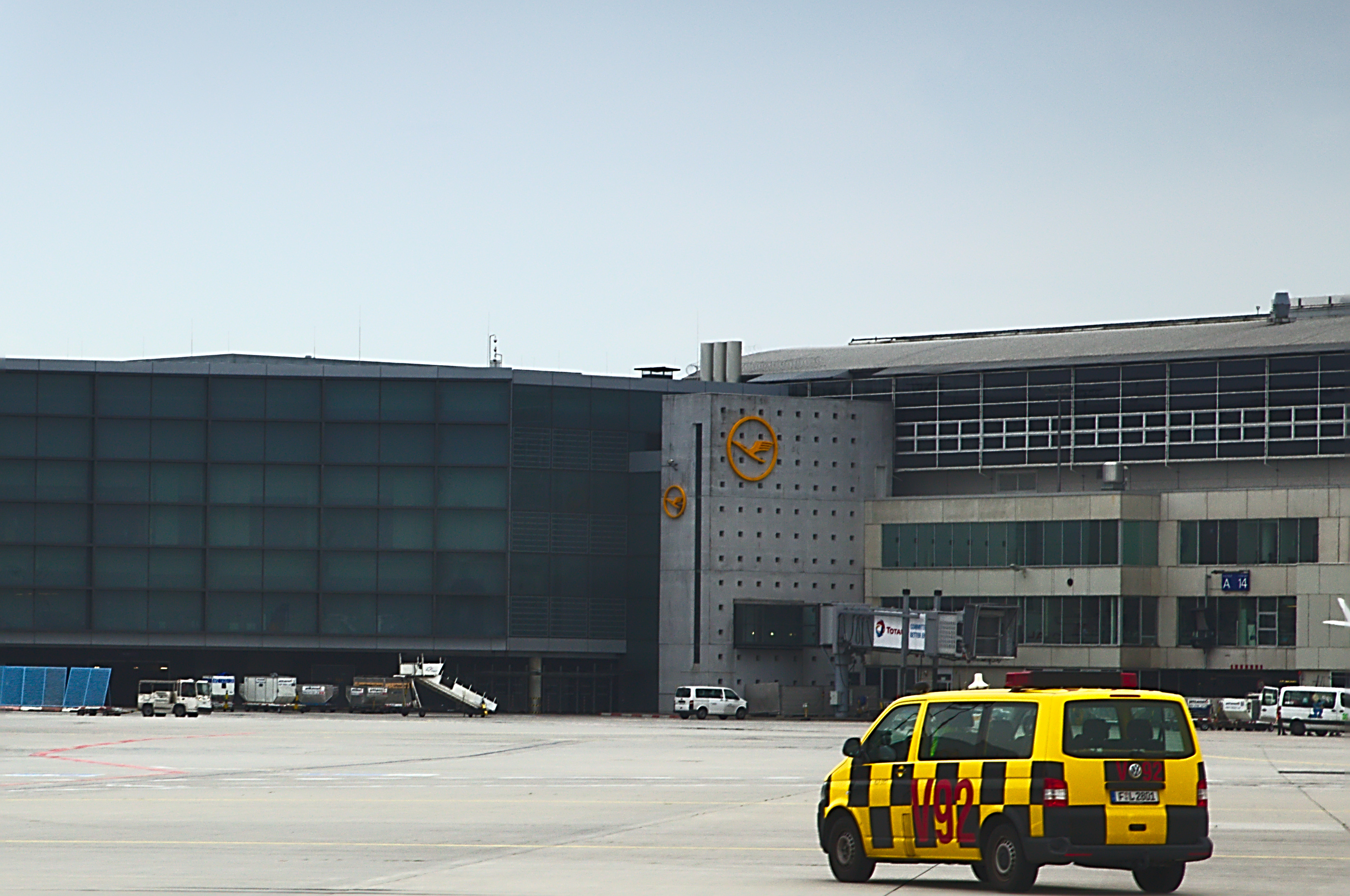 Vorfeld Frankfurt Airport